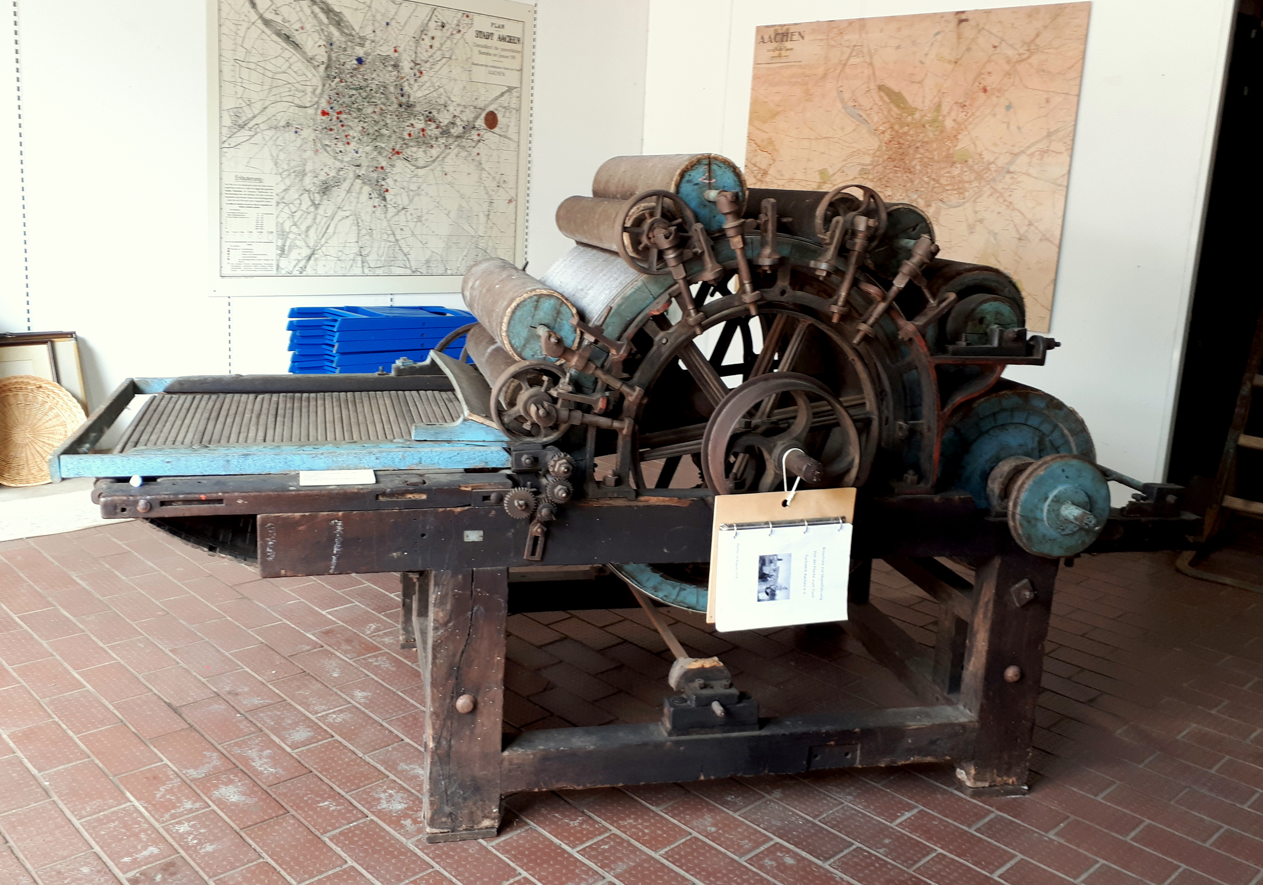 Uralt-Krempel – System Cockerill; eine Kardiermaschine aus der Streichgarnspinnerei Guillaume in St. Cecile/Florenville/Belgien für das Tuchwerk Aachen. Sie ist das derzeit älteste Exponat der Ausstellung und wurde um 1830 nach dem Vorbild der englisch-belgischen Familie Cockerill von einem unbekannten Hersteller entwickelt.